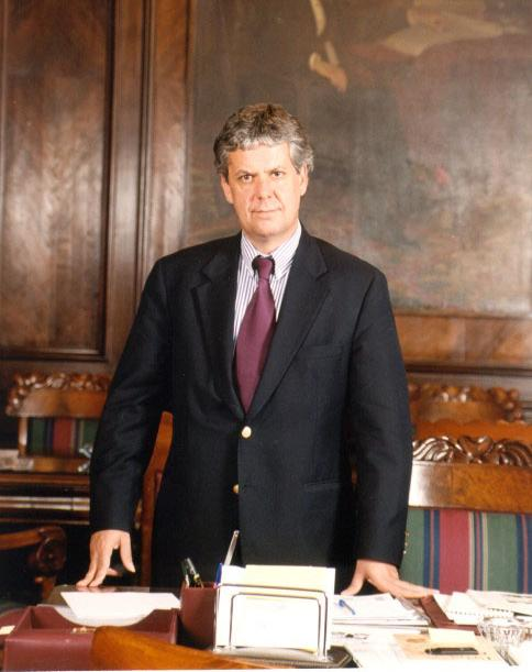 Ministro de Hacienda del tercer gobierno de la Concertación (Ricardo Lagos), Nicolás Eyzaguirre, en 2000.